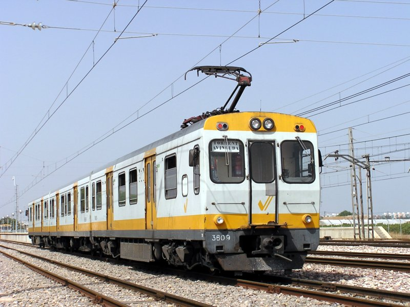 UT 3609 of Ferrocarrils de la Generalitat Valenciana at València Sud workshop